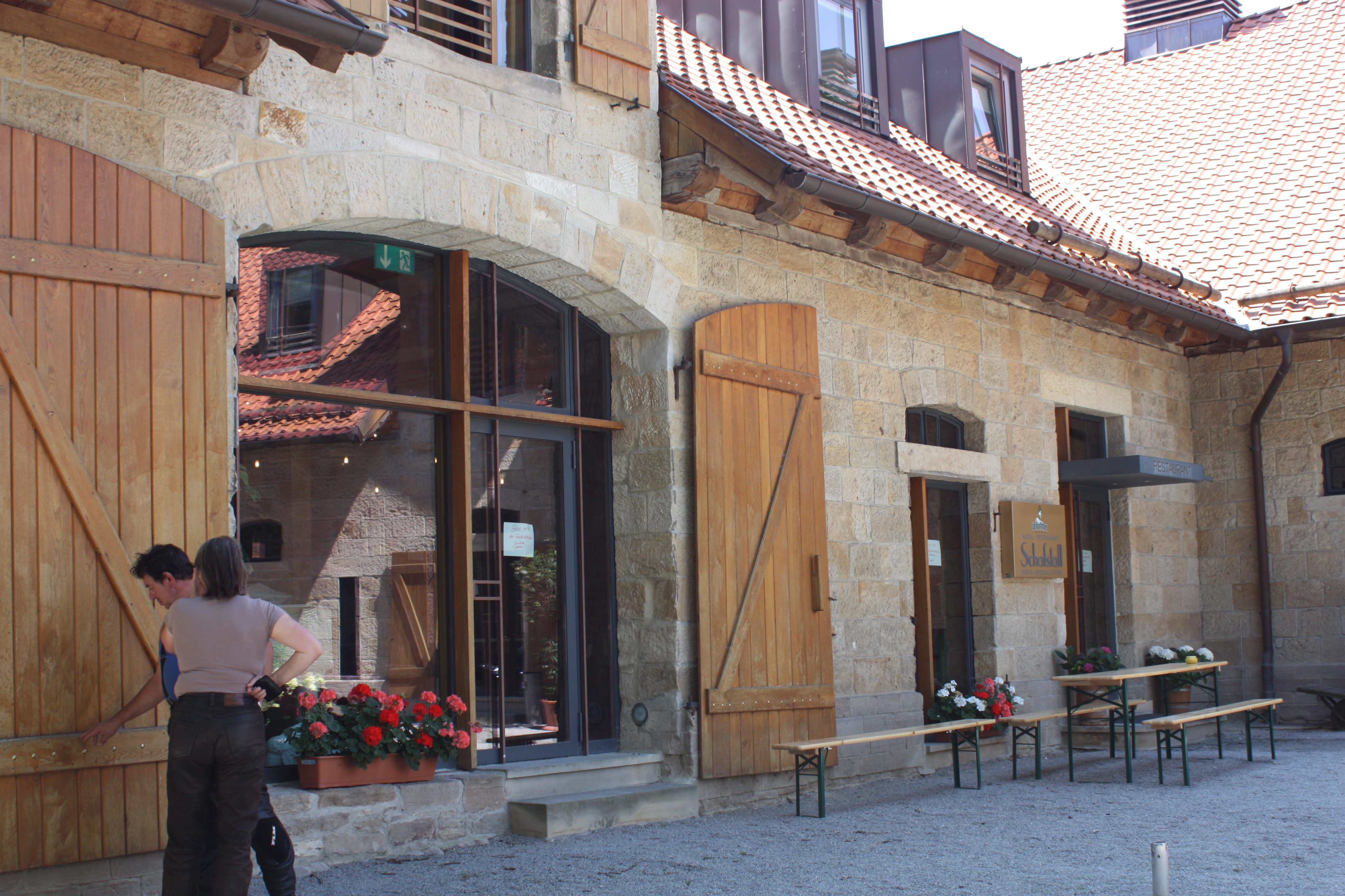 Schafstall